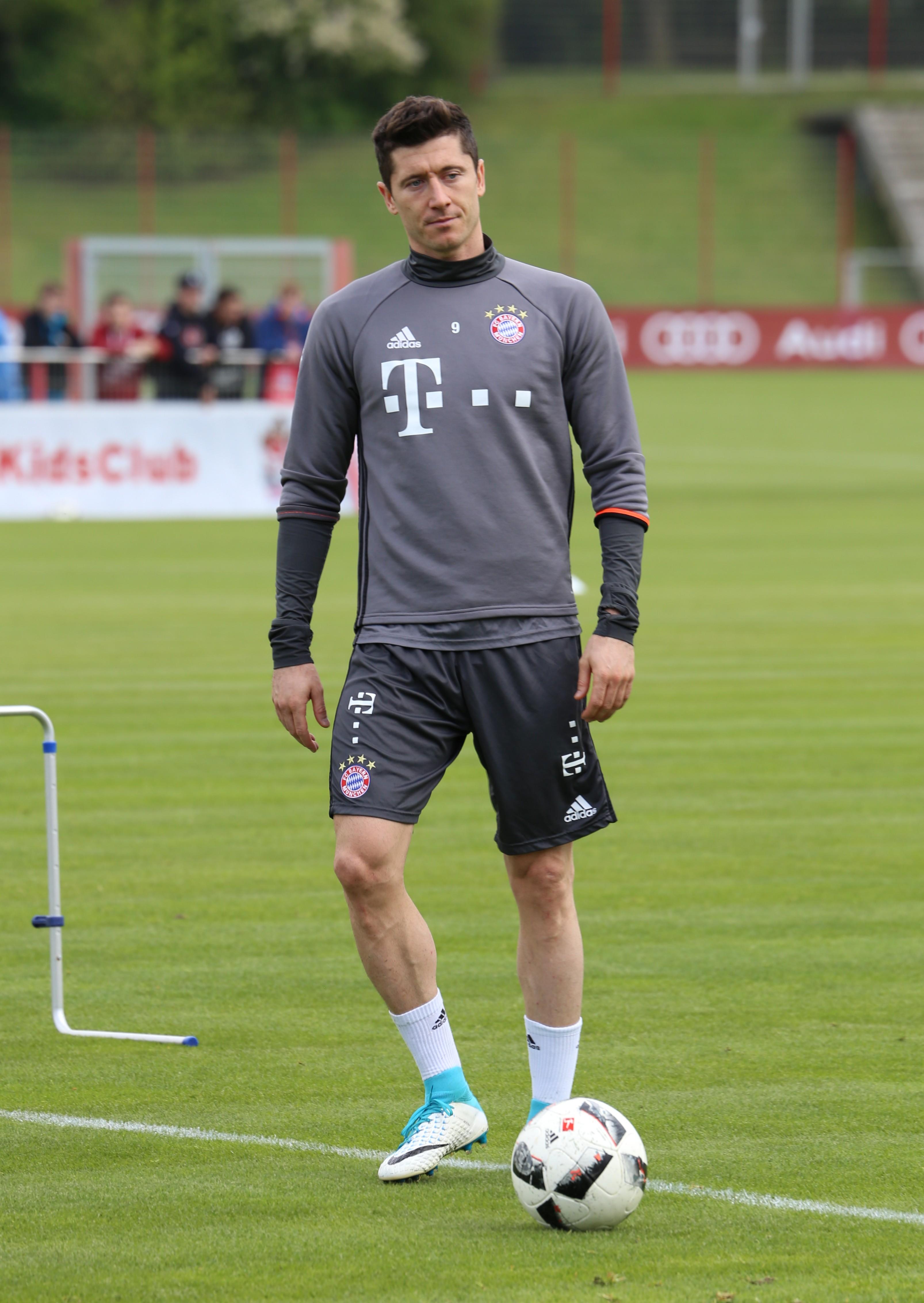 Robert Lewandowski, am 3. Mai 2017 beim Training auf dem Gelände des FC Bayern München